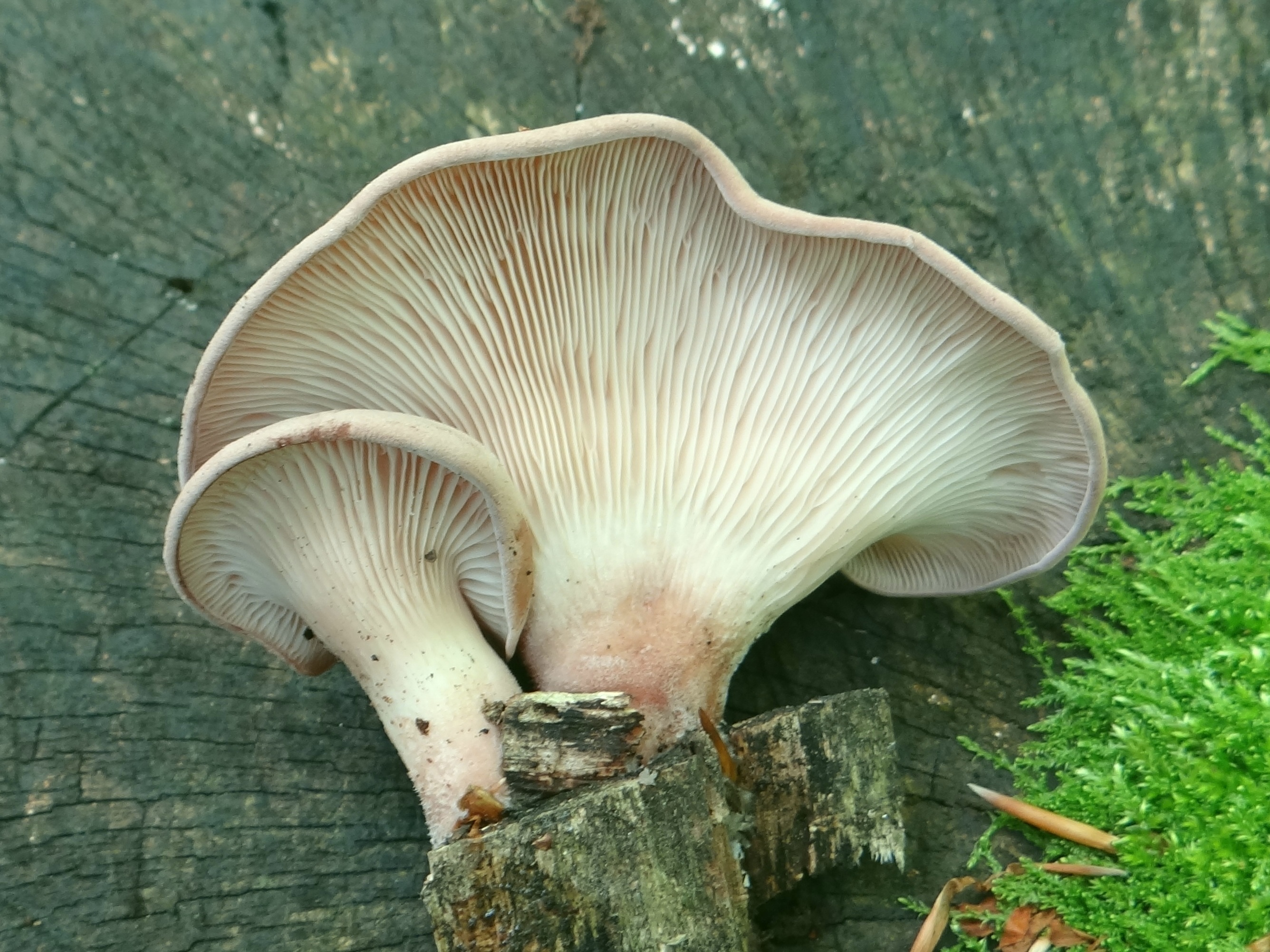 Lentinus strigosus (habitat:Beskid Wyspowy, góra Kamionna)